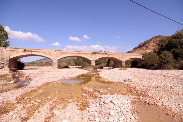 Río Arba de Luesia bajo el puente de la carretera que une Luesia y Uncastillo.